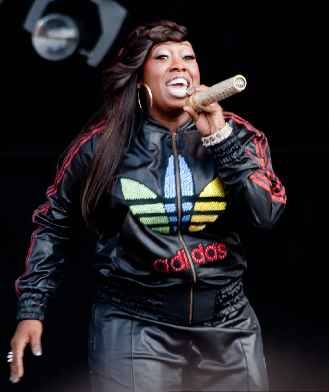 en concert en 2006